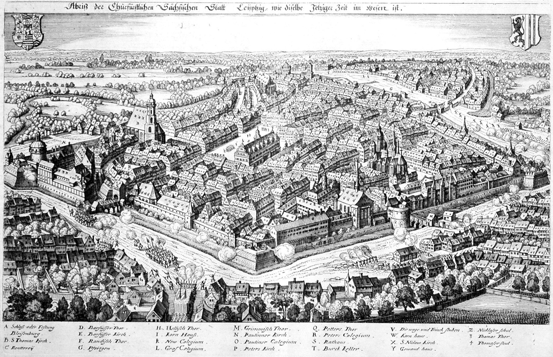 Leipzig, Kupferstich 20,5 × 32 cm aus Theatrum Europaeum, Bd.II (1637), Ansicht aus Südost.